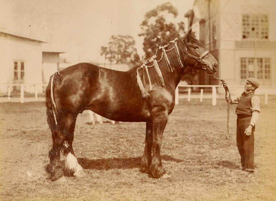 Sociedad Rural Argentina. Primer premio (Rom Blossom, lote 690), Haras Jorge Bell.